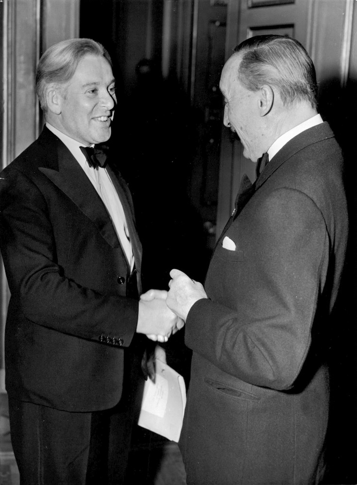 Mr D. Hardman välkomnas av Svensk-Engelska föreningens ordförande generallöjtnant Hugo CederschiöldLika delar undervisning för handen och för hjärnan vill den engelske undervisningsministerns parlamentssekreterare ha i de engelska skolorna. "Det läggs fortfarande alldeles för vid bokstudierna; vad tjänar det till att lagra en massa kunskaper som man inte kan använda i elevernas huvuden?" Frågan ställdes ...